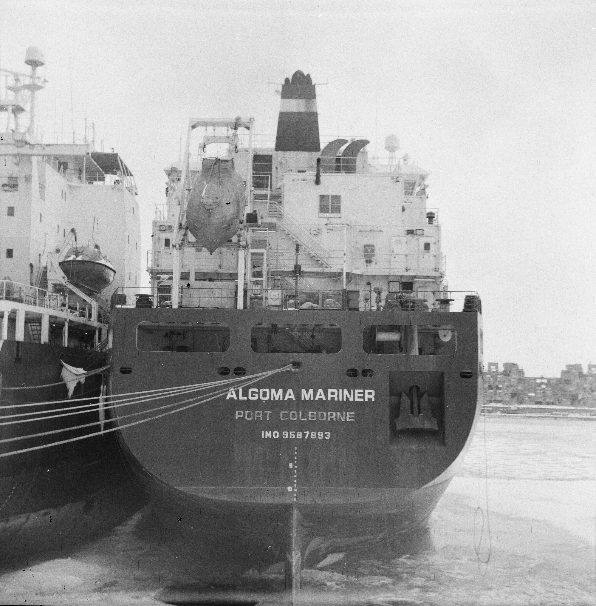 Lubitel166 Ilford Delta 400